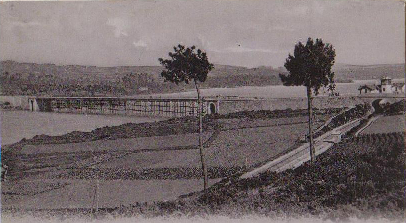 Ponte da Pasaxe a principios do século XX fotografiada por José Sellier.